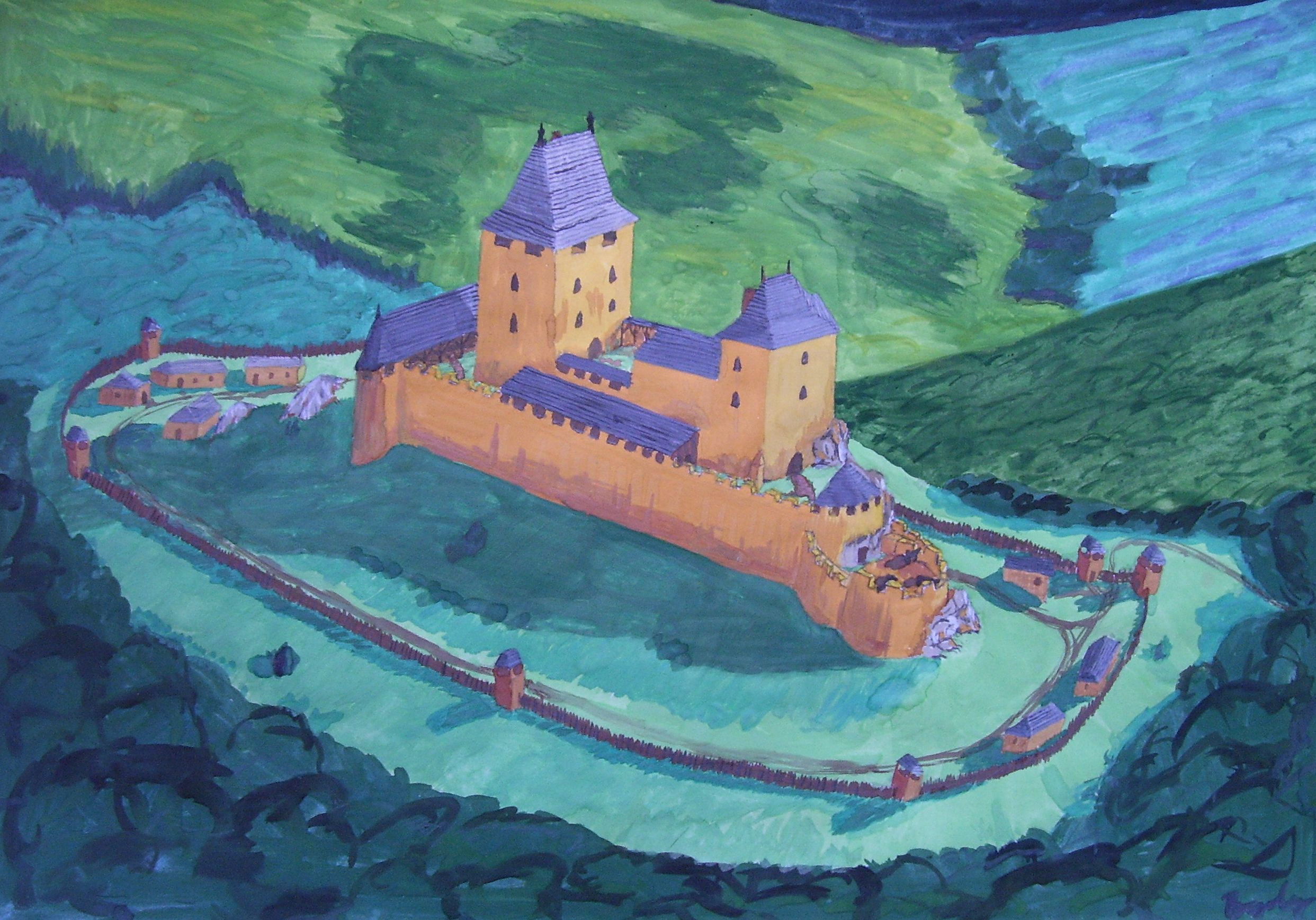 Drégely váráról készült rekonstrukciós kép, a vár lehetséges 16. század közepei állapota szerint